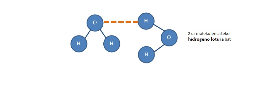 Ur molekulen arteko hidrogeno lotura